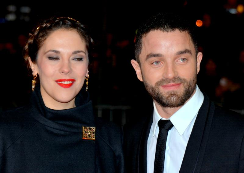 Alysson Paradis et Guillaume Gouix à la cérémonie des César